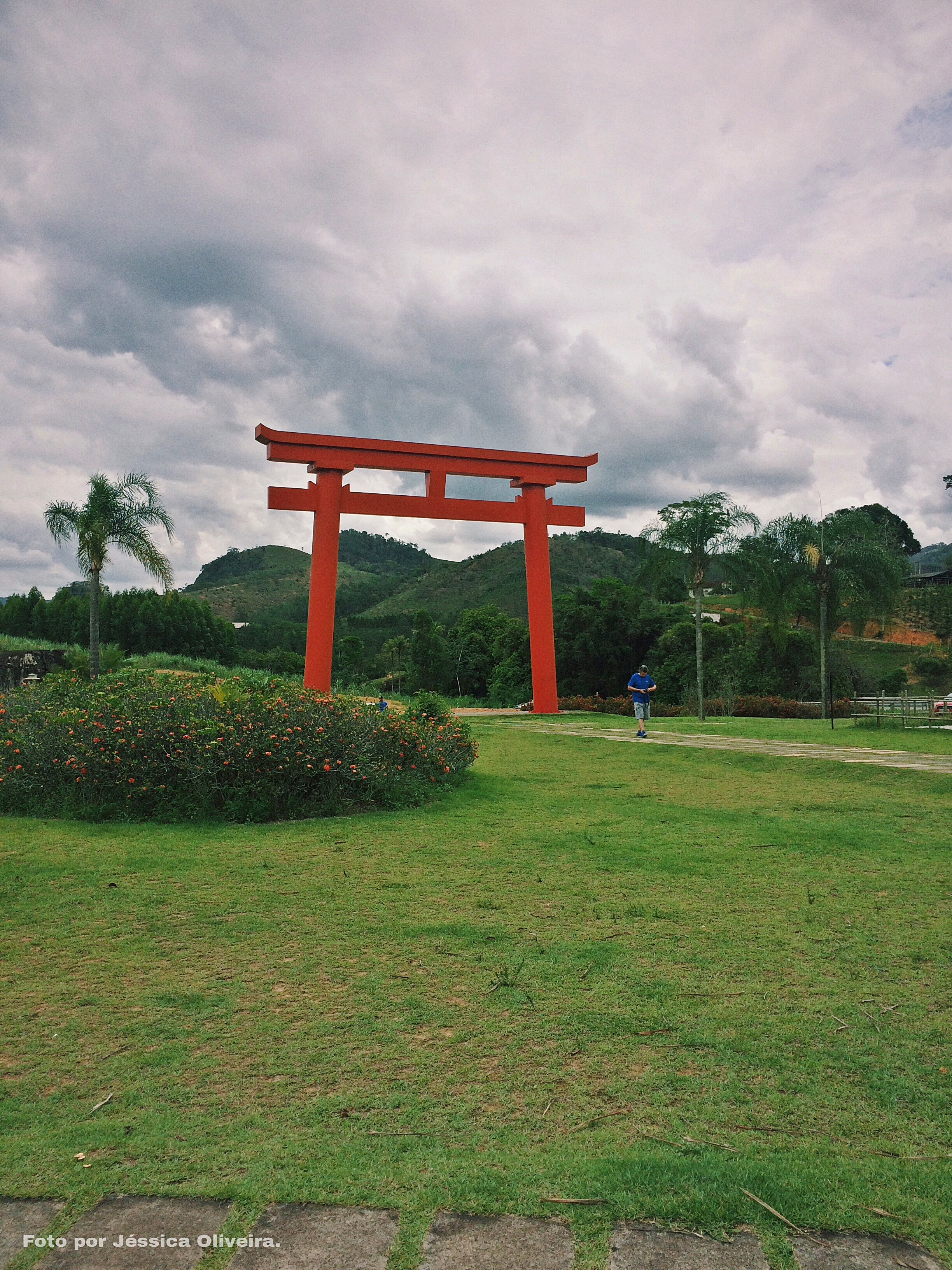 Portal de entrada do Mosteiro Zen Budista, localizado no Morro da Vargem, em Ibiraçu (ES).